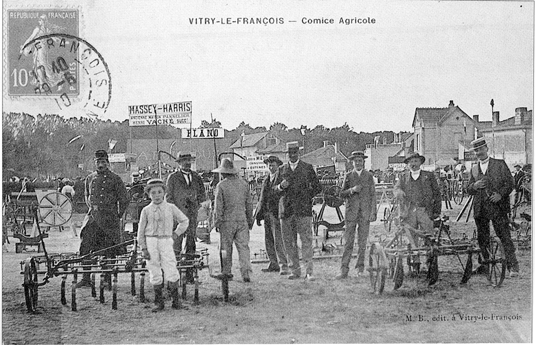 sur une vue ancienne.